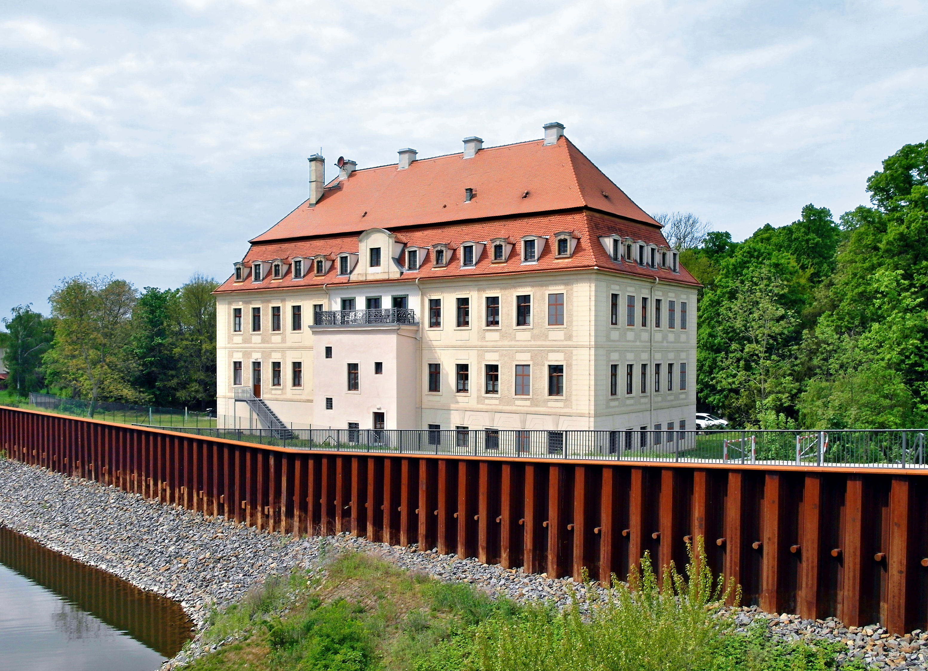 12.05.2017 01591 Gröba (Riesa), Kirchstraße 46 (GMP: 51.320693,13.289074): Schloß Gröba, 1707 für Johann Georg von Arnim und seine Frau errichtet. 1949-1975 Altersheim, dann Leerstand. Ab 1983 Rat des Kreises Riesa / Landratsamt. 2001 privat verpachtet. Nach dem EIbehochwasser 2002 zog sich der Pächter wieder aus Gröba zurück. Seit 2012 nutzt ein Pflegedienst das Schloß für betreutes Wohnen. Südfassade zum Hafenkanal der Döllnitzmündung. [SAM9896.JPG]20170512715DR.JPG(c)Blobelt